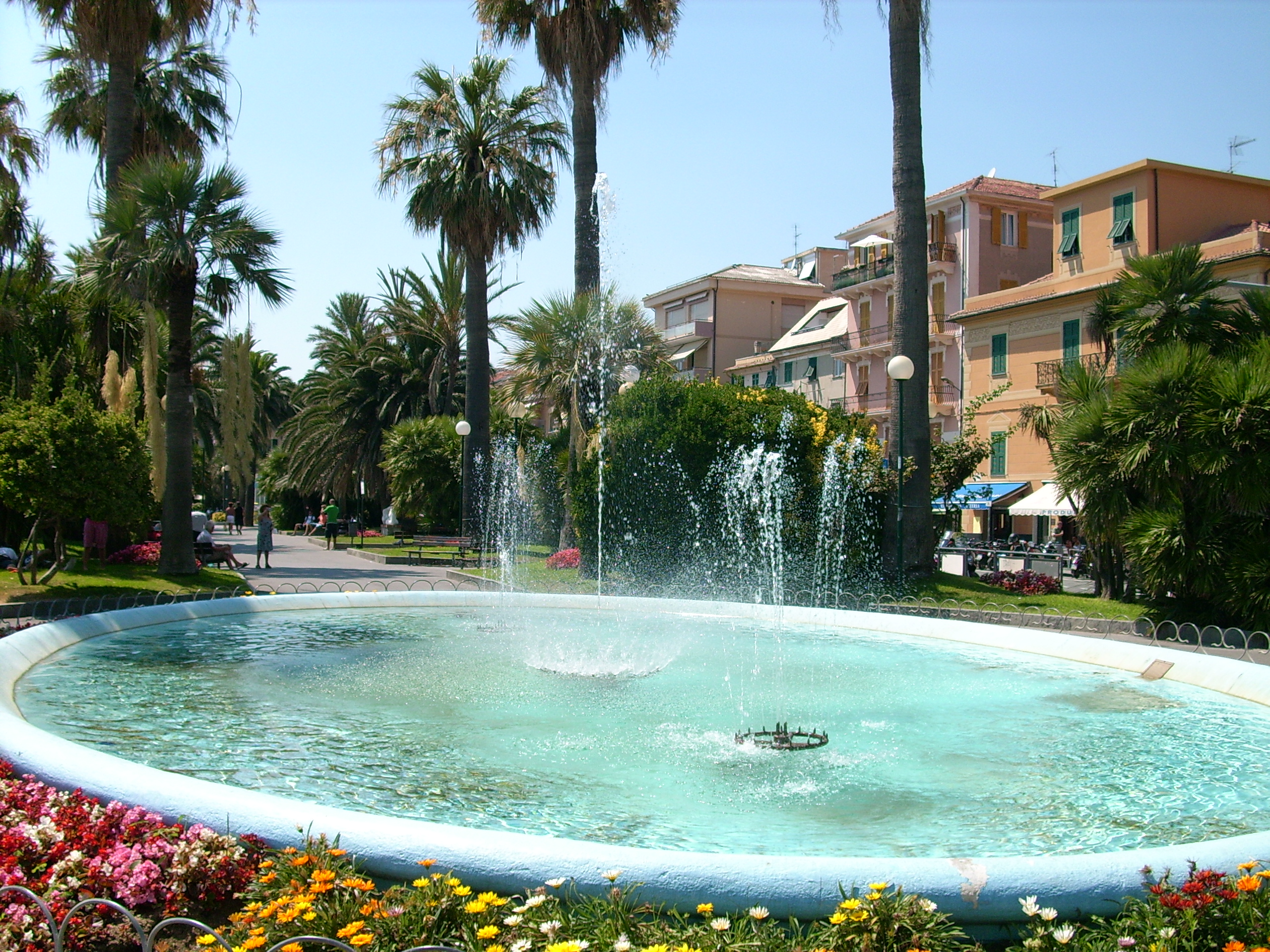 Lungomare di Varazze, Liguria, Italia